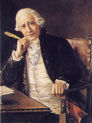 Francisco Salvá según retrato de José María Marqués pintado en 1900 con motivo del homenaje que le brindó la Reial Acadèmia de Medicina de Catalunya, donde actualmente se conserva.